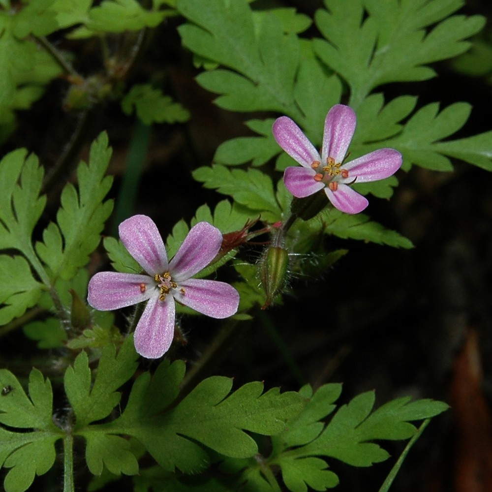 Geranium robertianum in Västerås